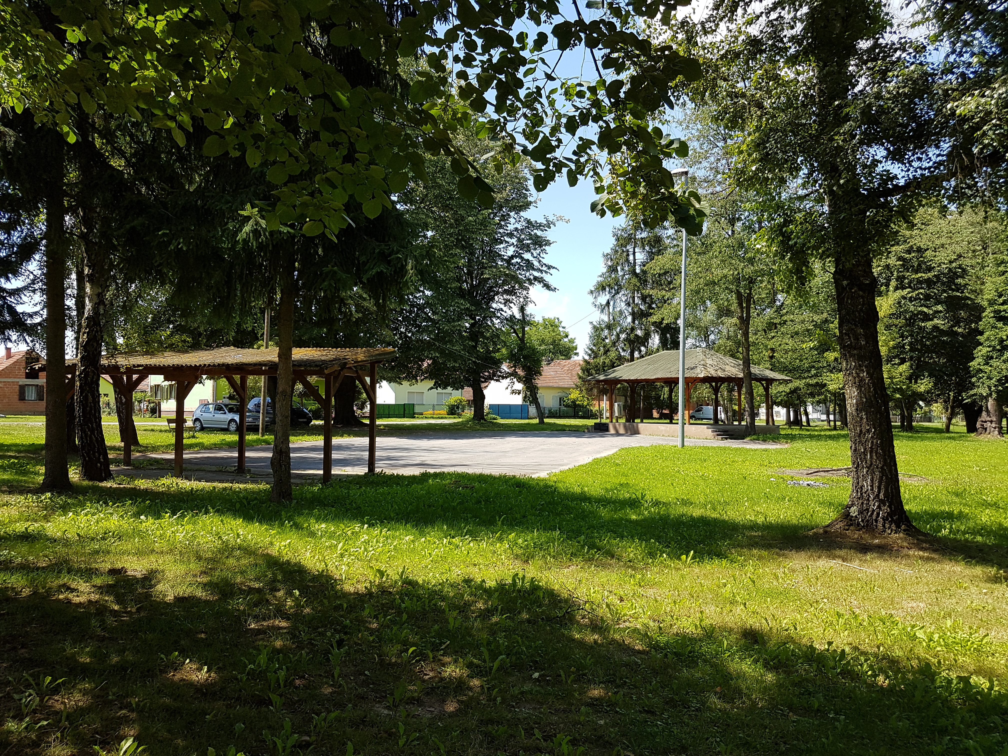 Park "Čimen" u Špišić Bukovici